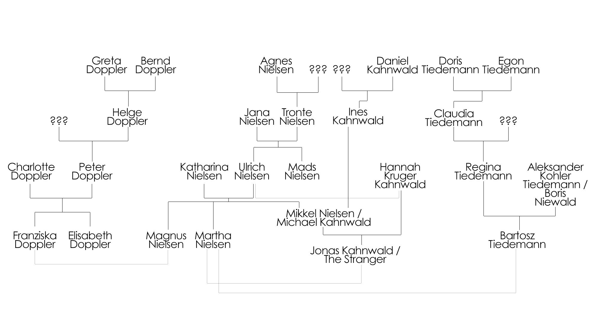 Dark: Prima Stagione